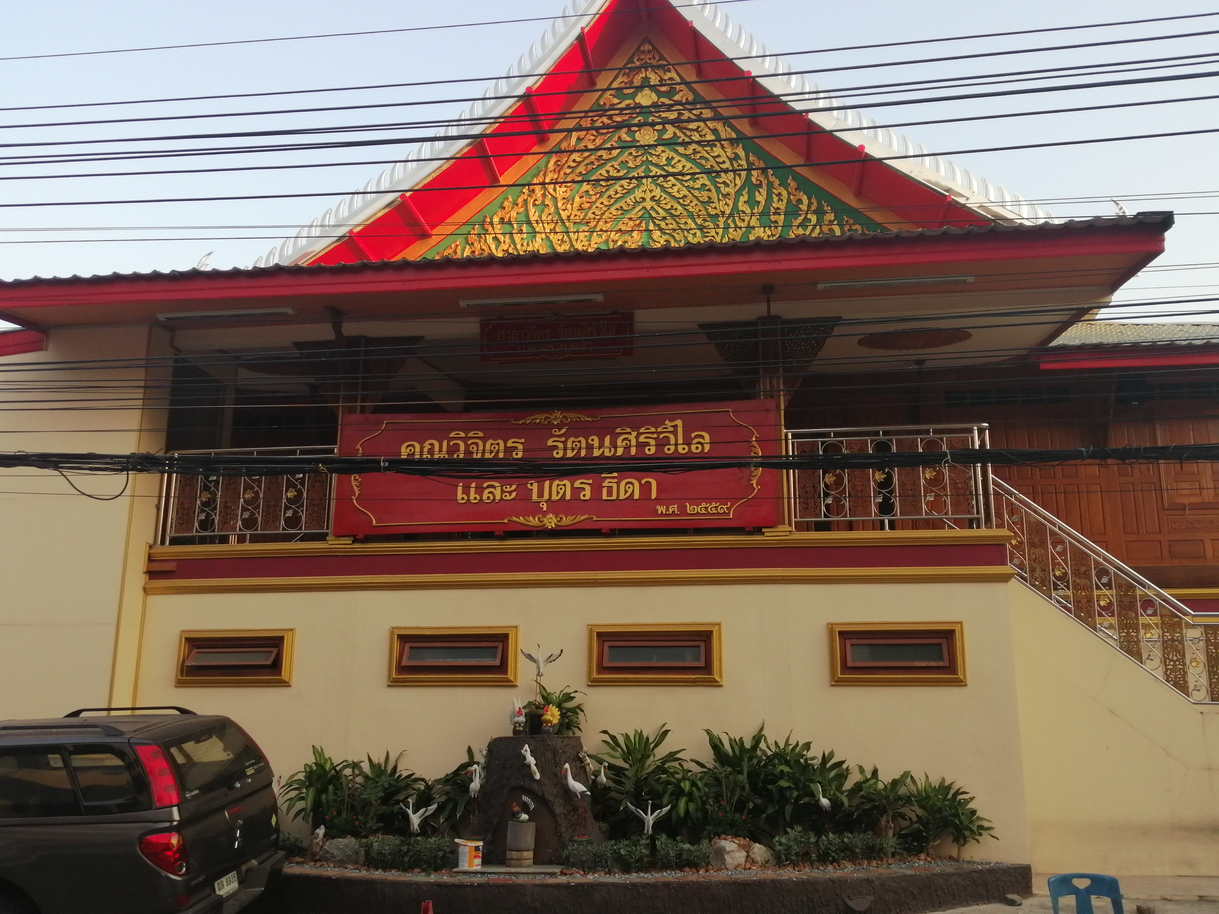 ศาลาวิจิตร รัตนศิริวิไลย